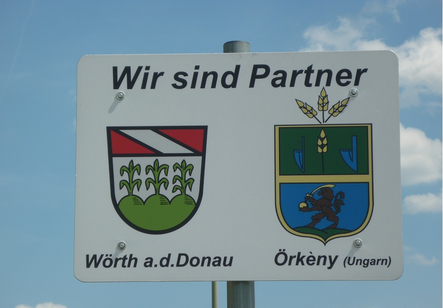 Städtepartnerschaft Wörth an der Donau - Örkény Offizielles Stadtschild